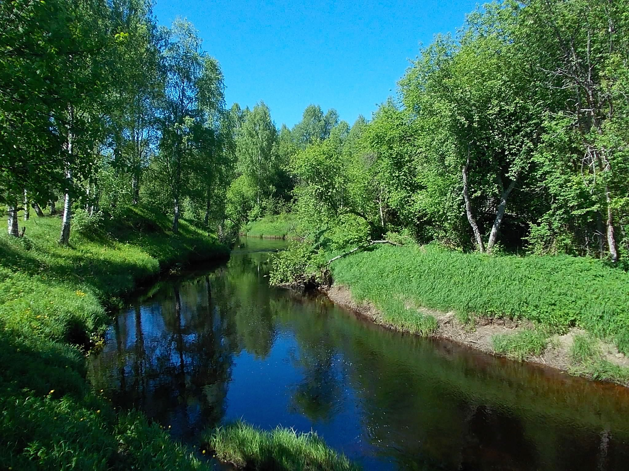 Река Яндеба недалеко от д. Яндеба